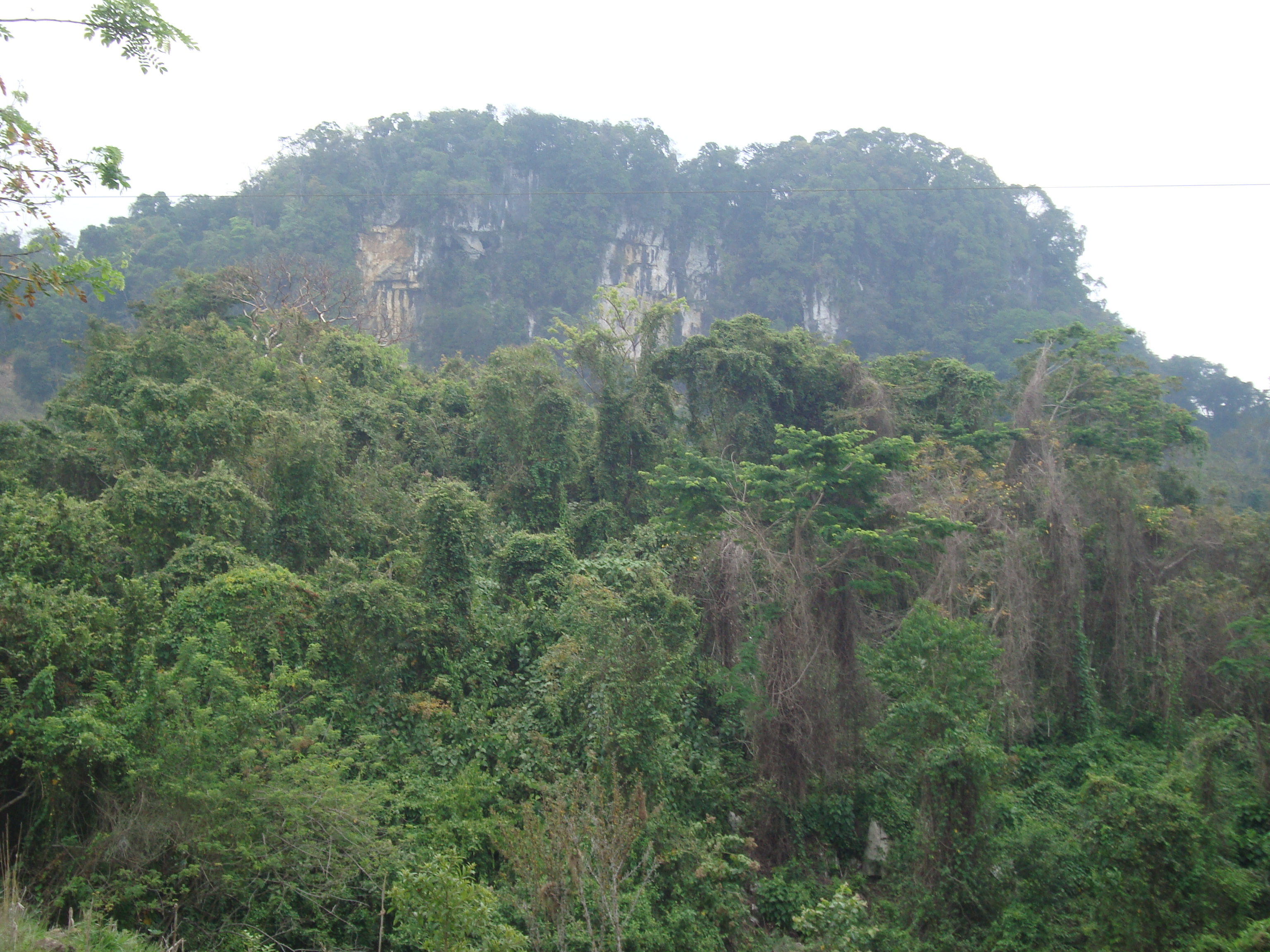 Cerro en la Reserva Ecológica de Agua Blanca. Municipio de Macuspana. Tabasco. México.